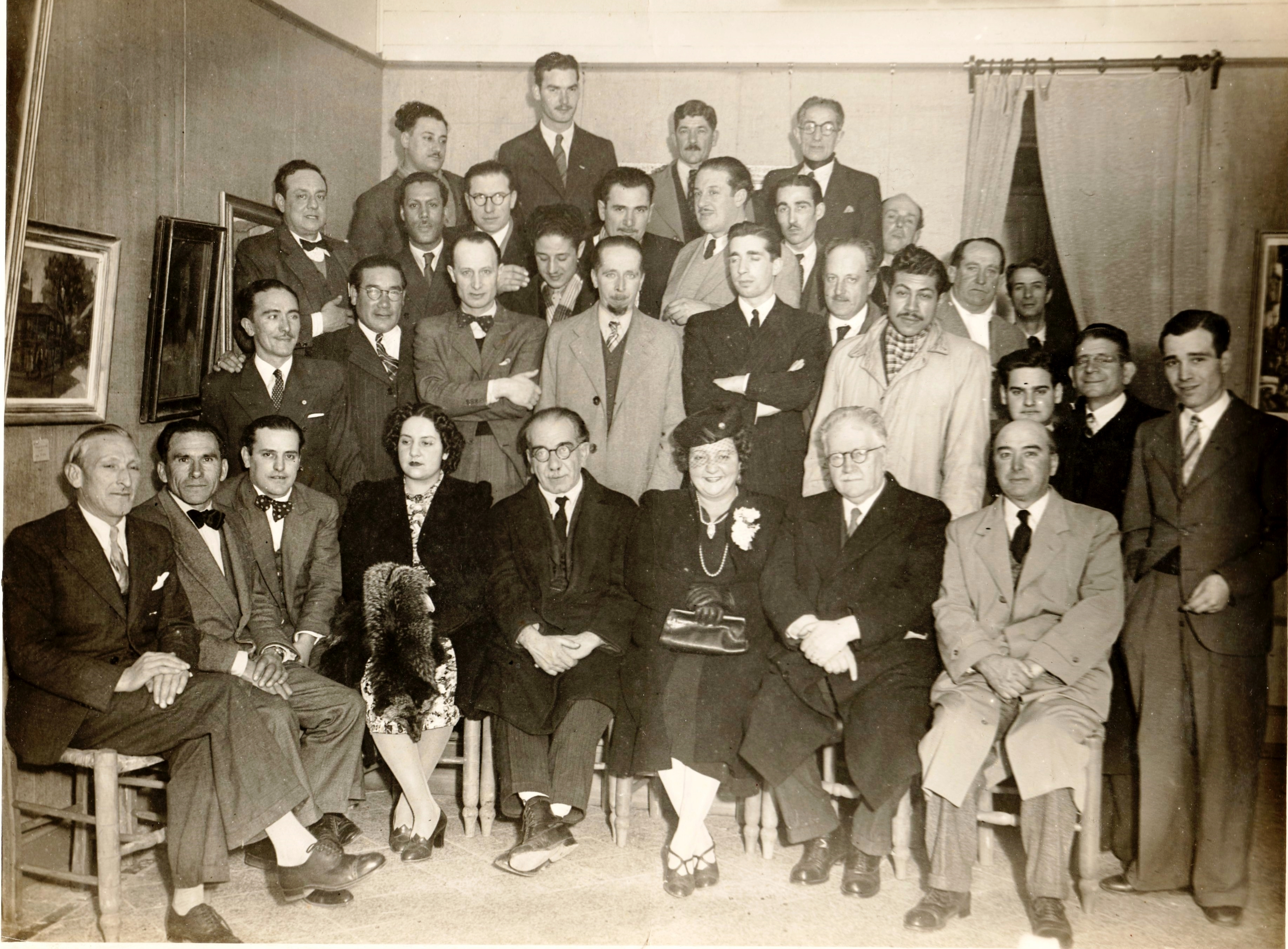 Miraglia en Impulso 1ª expo inaugural colectiva de socios 08-1940